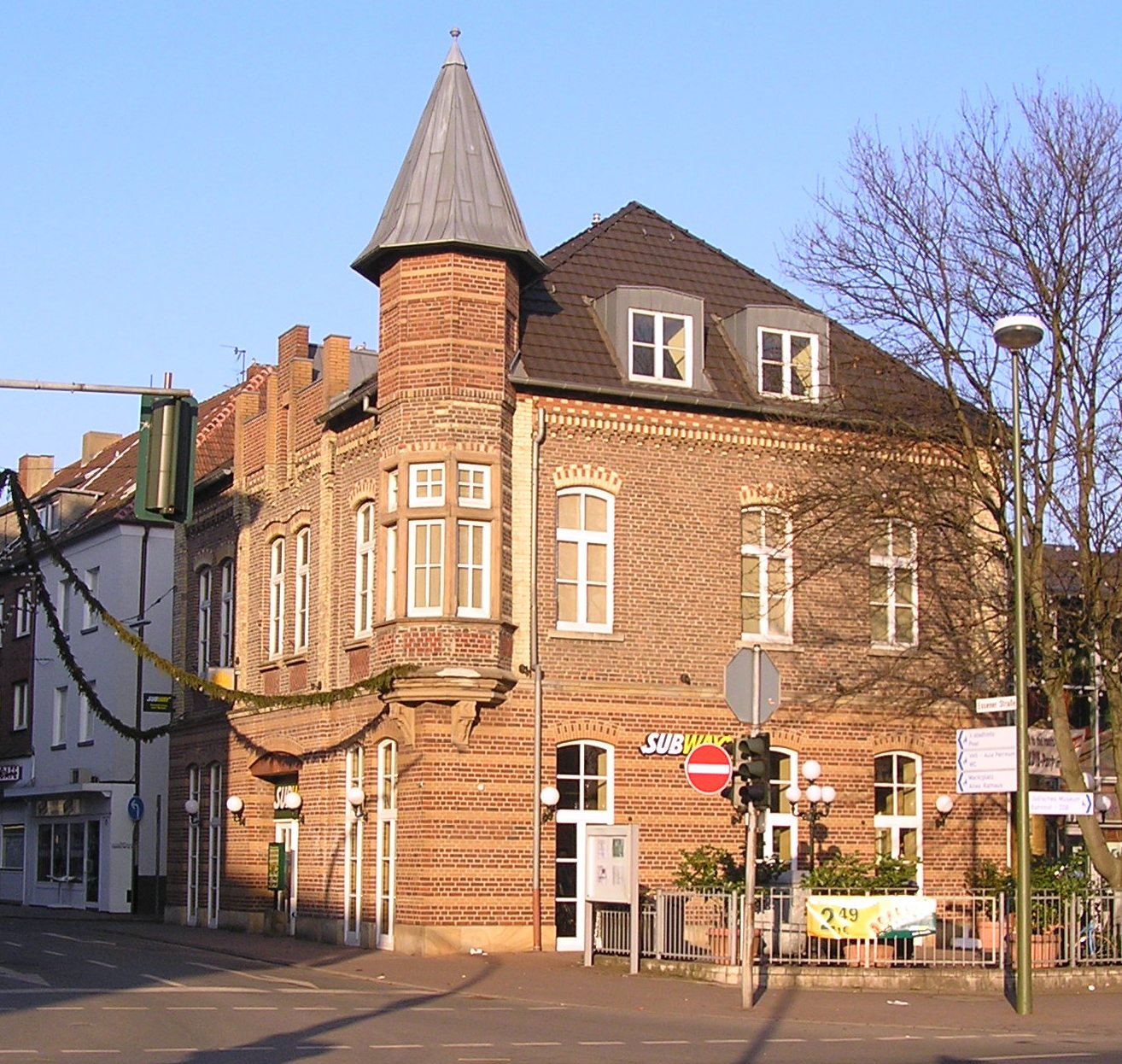 Building at Essener Tor, Dorsten